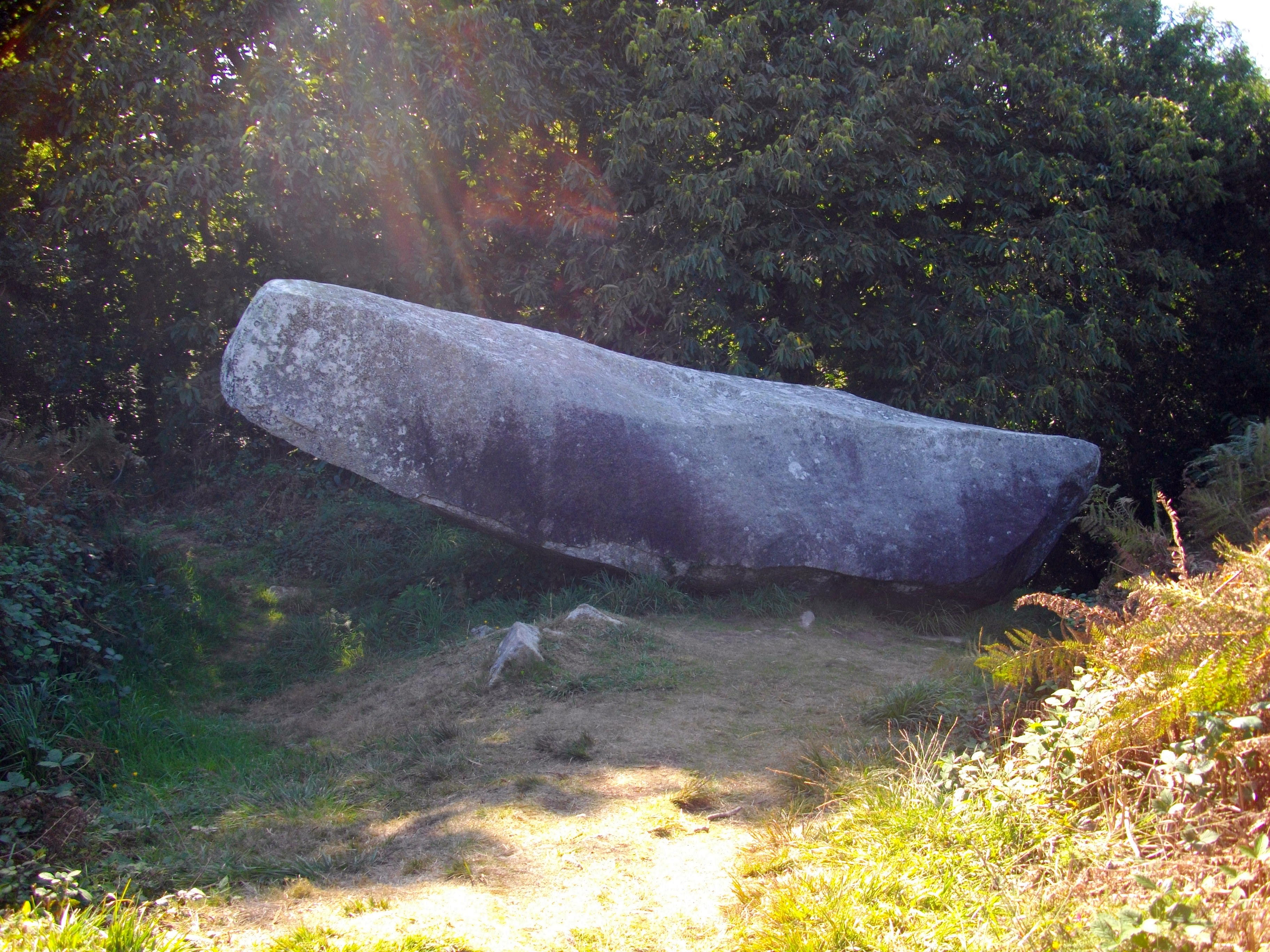 Menhir couché (Beuzec-Cap-Sizun) , appelé aussi Barque de Saint Conogan